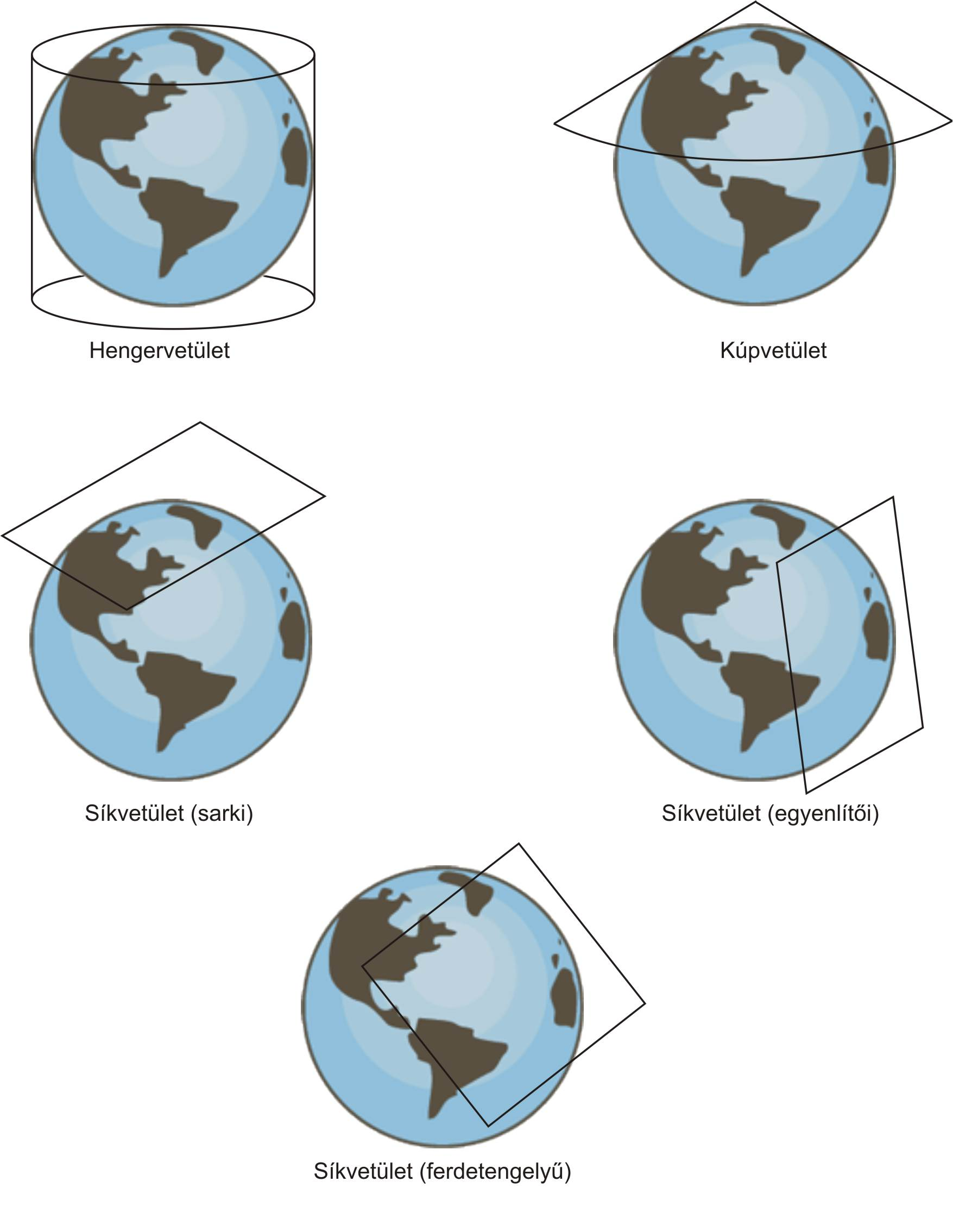 A valódi vetületek bemutatása